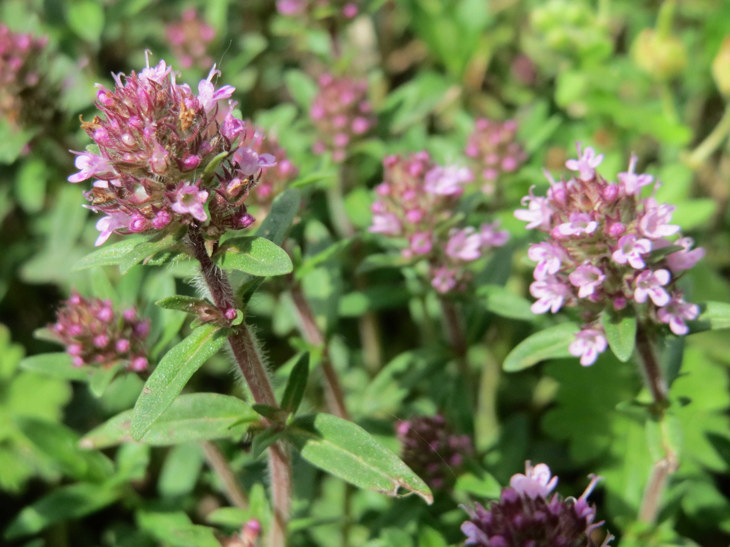 Sand-Thymian (Thymus serpyllum) am Stadtrand von Hockenheim